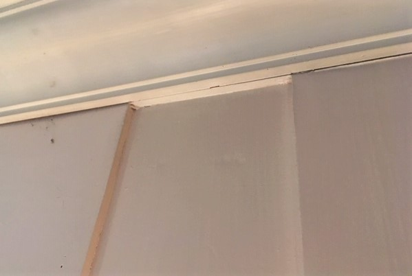 Lusing ved taklist